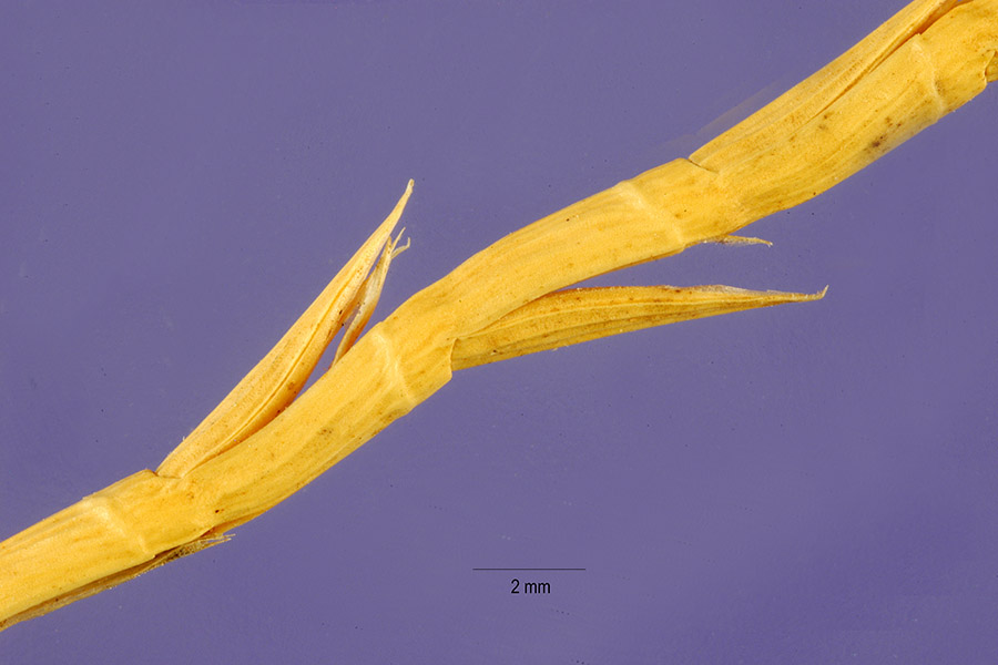 Hainardia cylindrica inflorescence